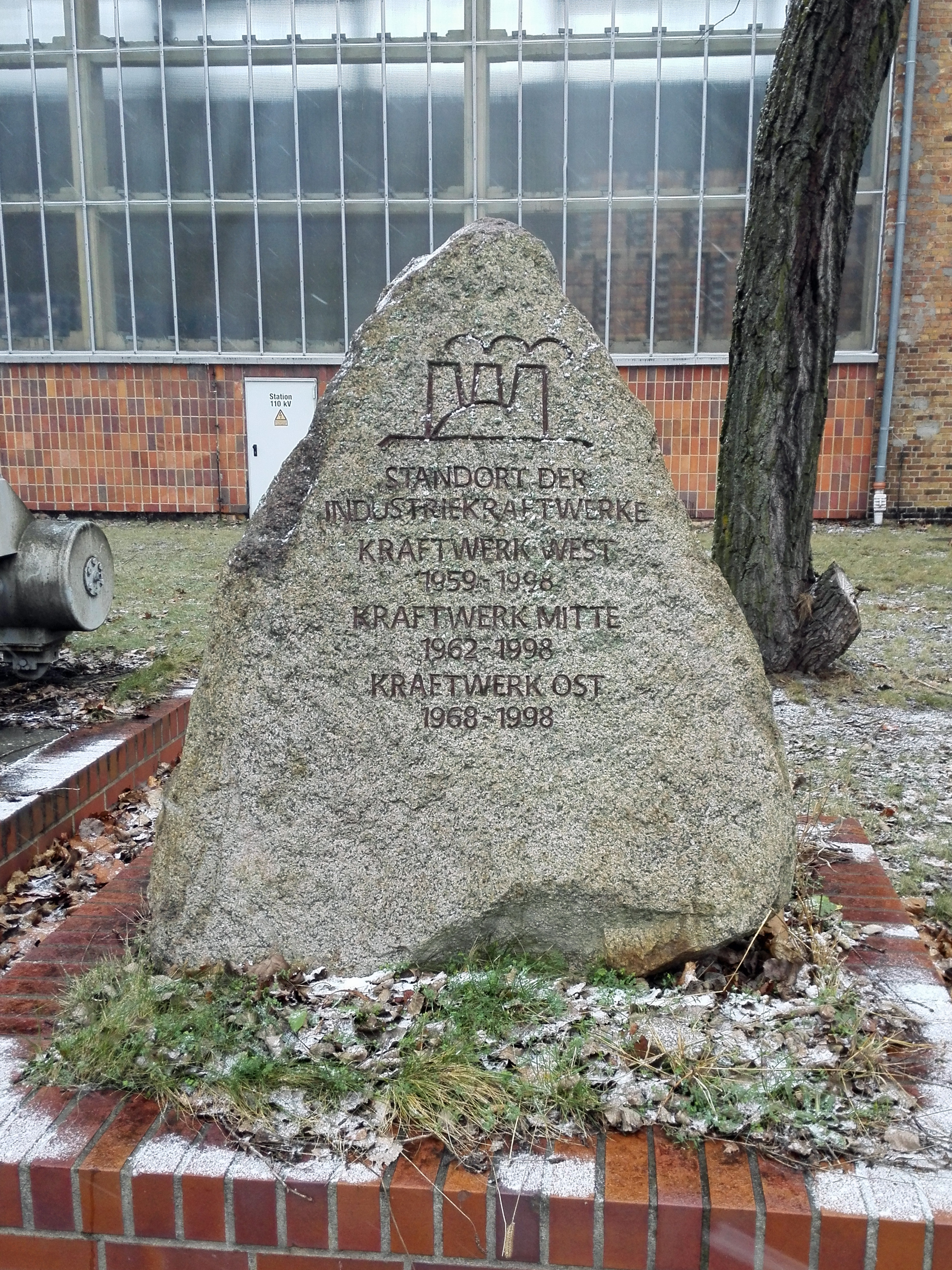 Gedenkstein auf dem Gelände des Industrieparkes Schwarze Pumpe, für die nach der politischen Wende abgerissenen Kraftwerke Ost, Mitte und West des Gaskombinates Schwarze Pumpe.